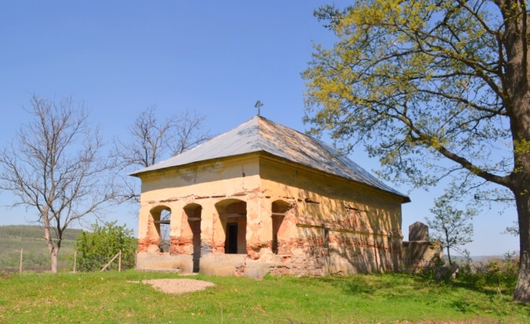 Biserica „Nașterea Maicii Domnului”, sat Poiana; comuna Căzănești În centrul satului 1836